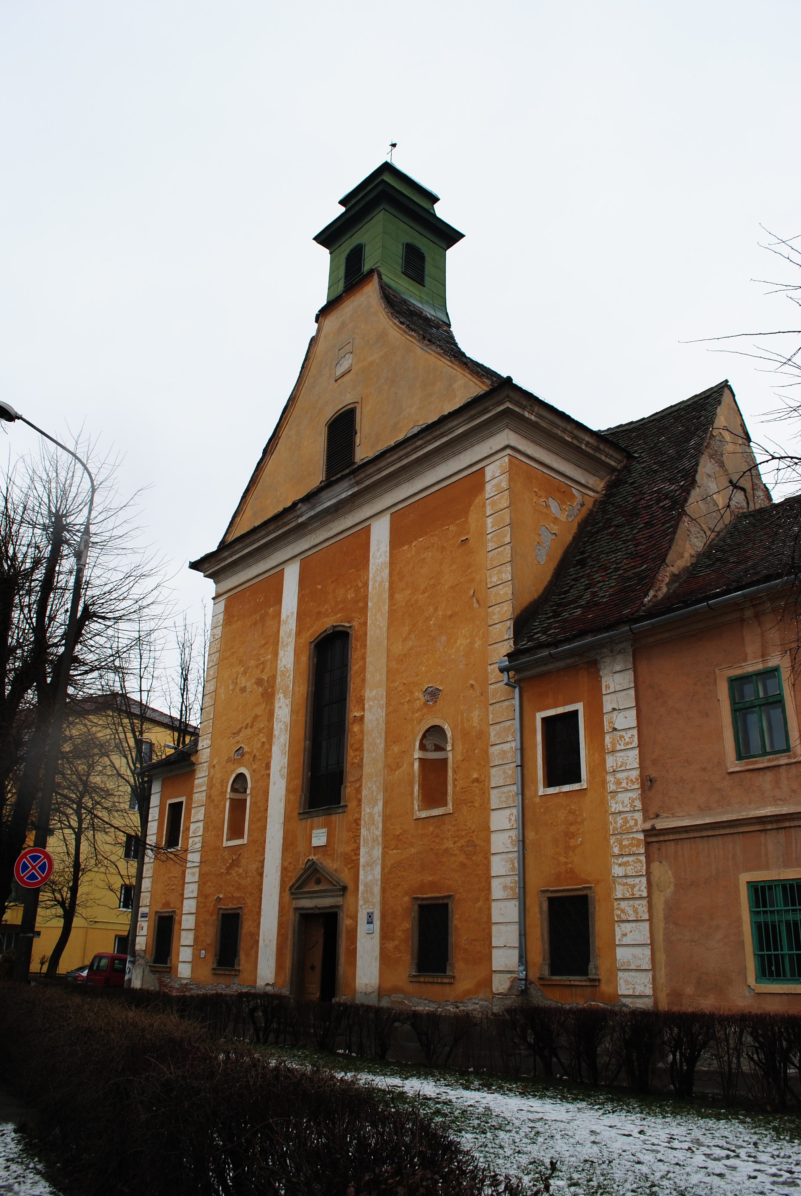 Biserica "Vizita Mariei la Elisabeta" 1767 - 1771 02